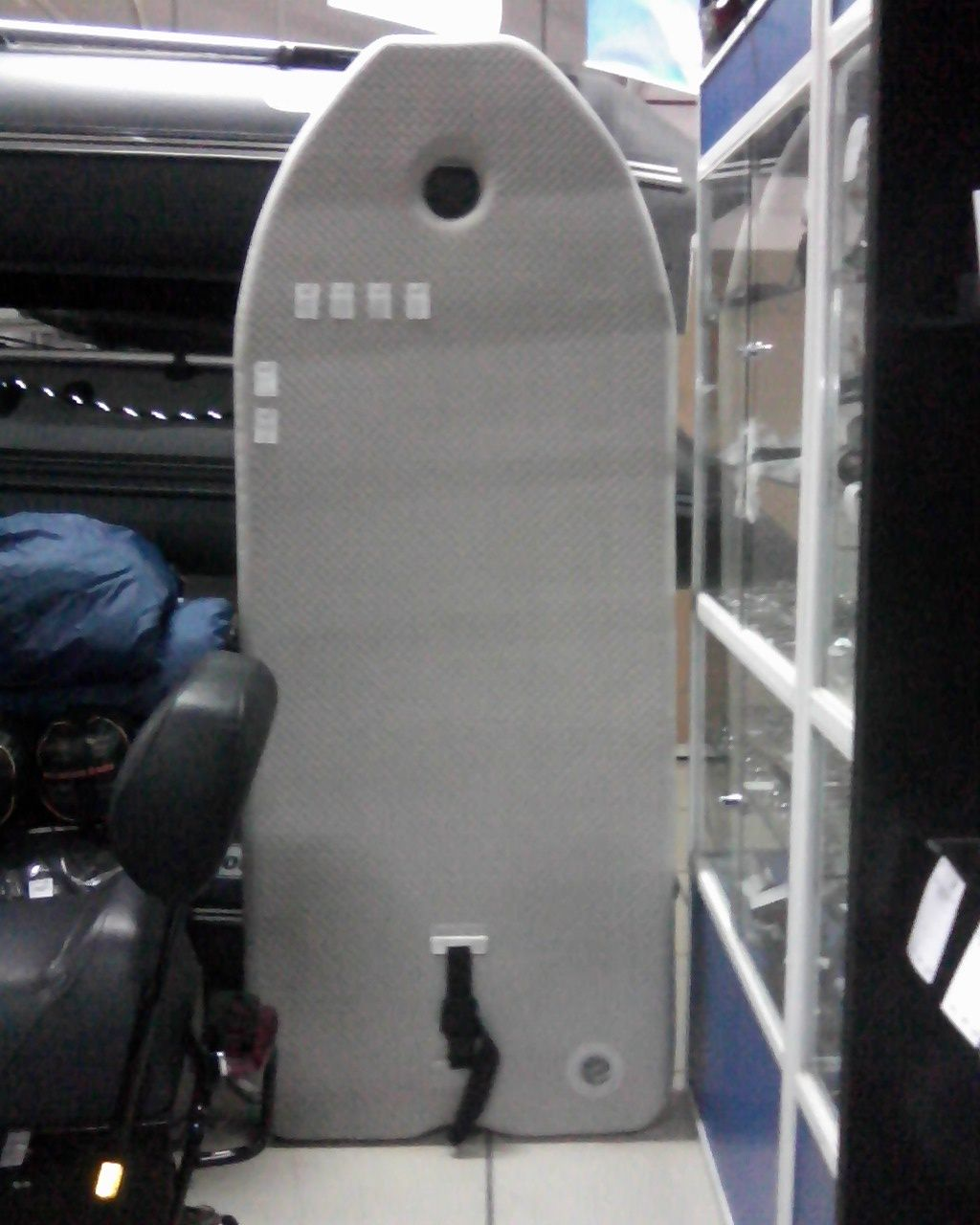 Вкладыш высокого давления для надувной лодки